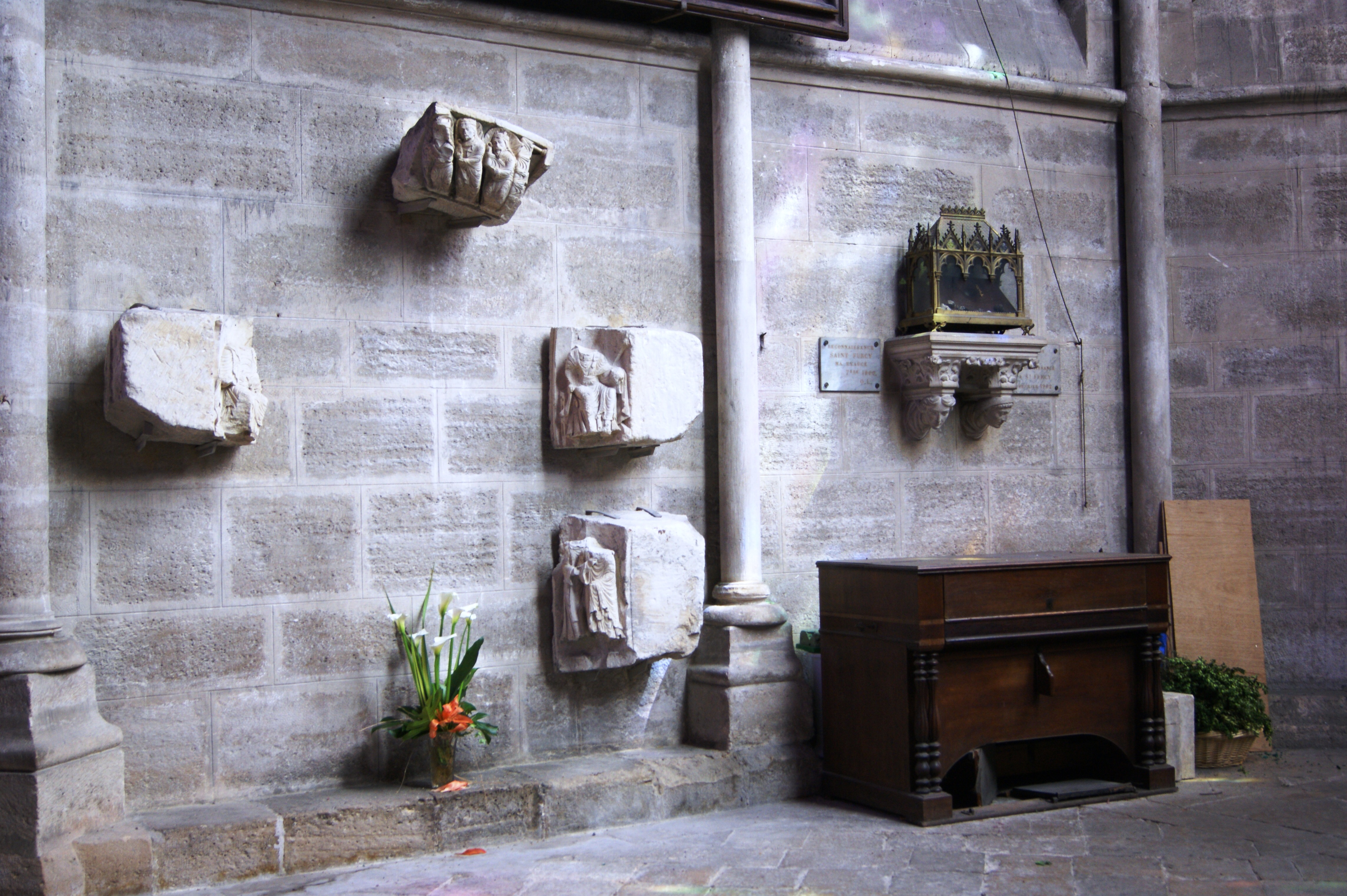 Chapelle Saint Fursy - Abbatiale Notre-Dame-des-Ardents et Saint-Pierre - Lagny sur Marne.